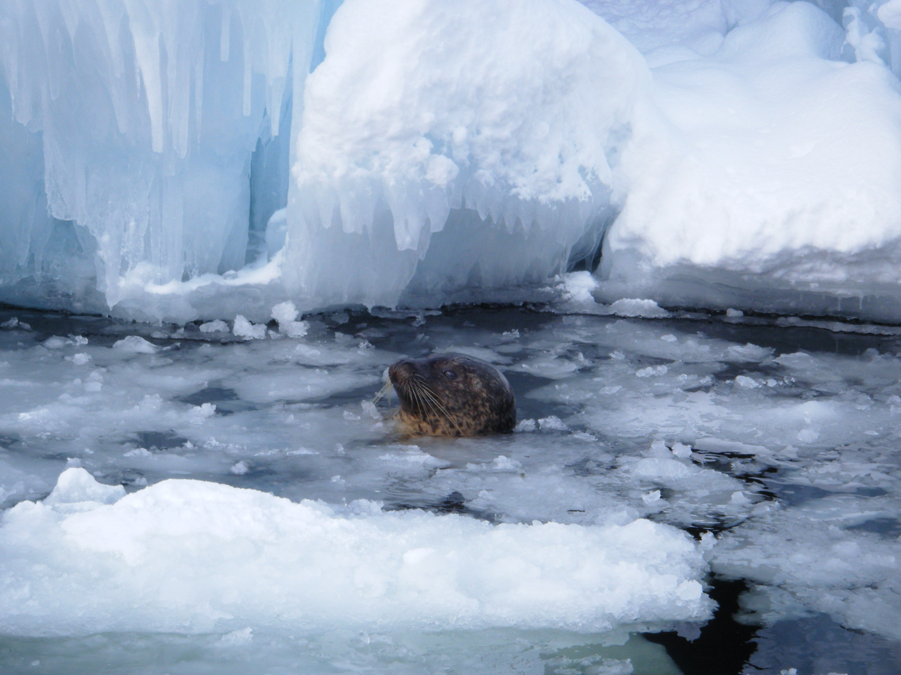 ゴマフアザラシ。冬季はこのように、流氷の隙間から顔を出して呼吸する。旭川市旭山動物園にて。